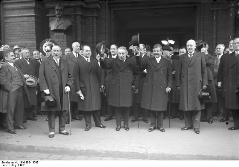 Aristide Briand der bekannte französische Aussenminister ist im Alter von 70 Jahren gestorben ! (Aus dem Wirken des grossen französischen Staatsmannes) Aristide Briand mit dem Ministerpräsidenten Laval bei seinem ersten Besuch in Berlin.